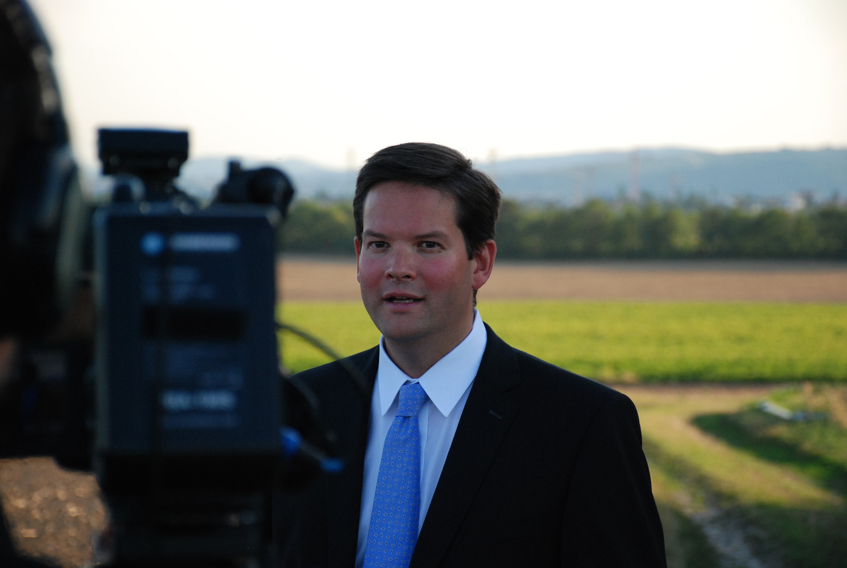 Lukas Mandl